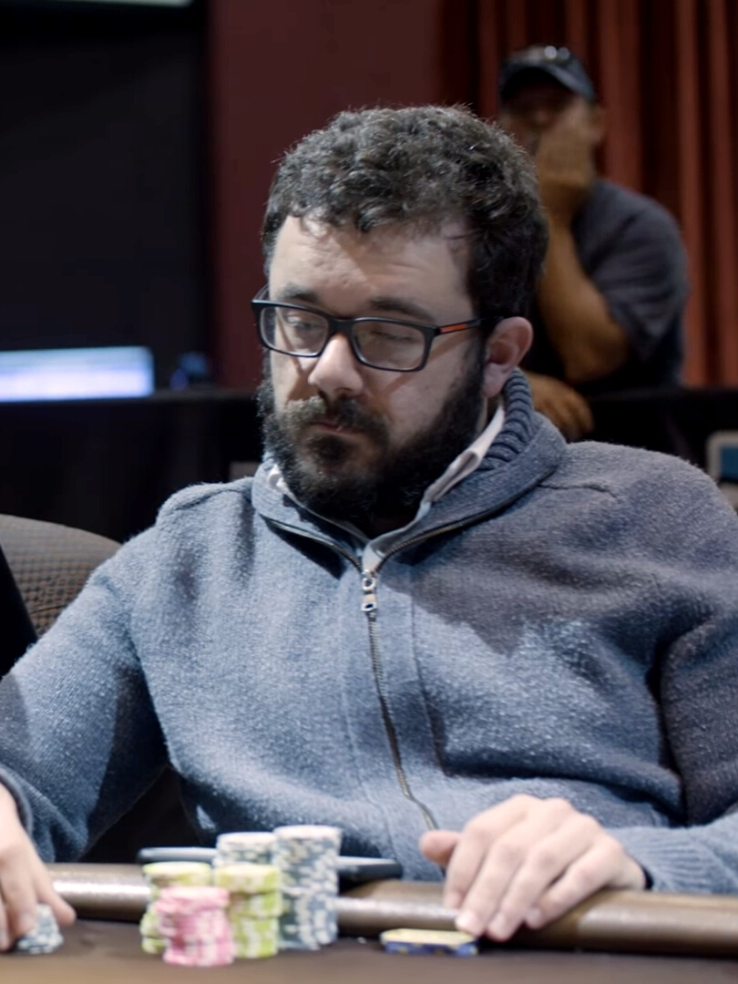 Anthony Zinno bei der Season XVII WPT Choctaw Championship